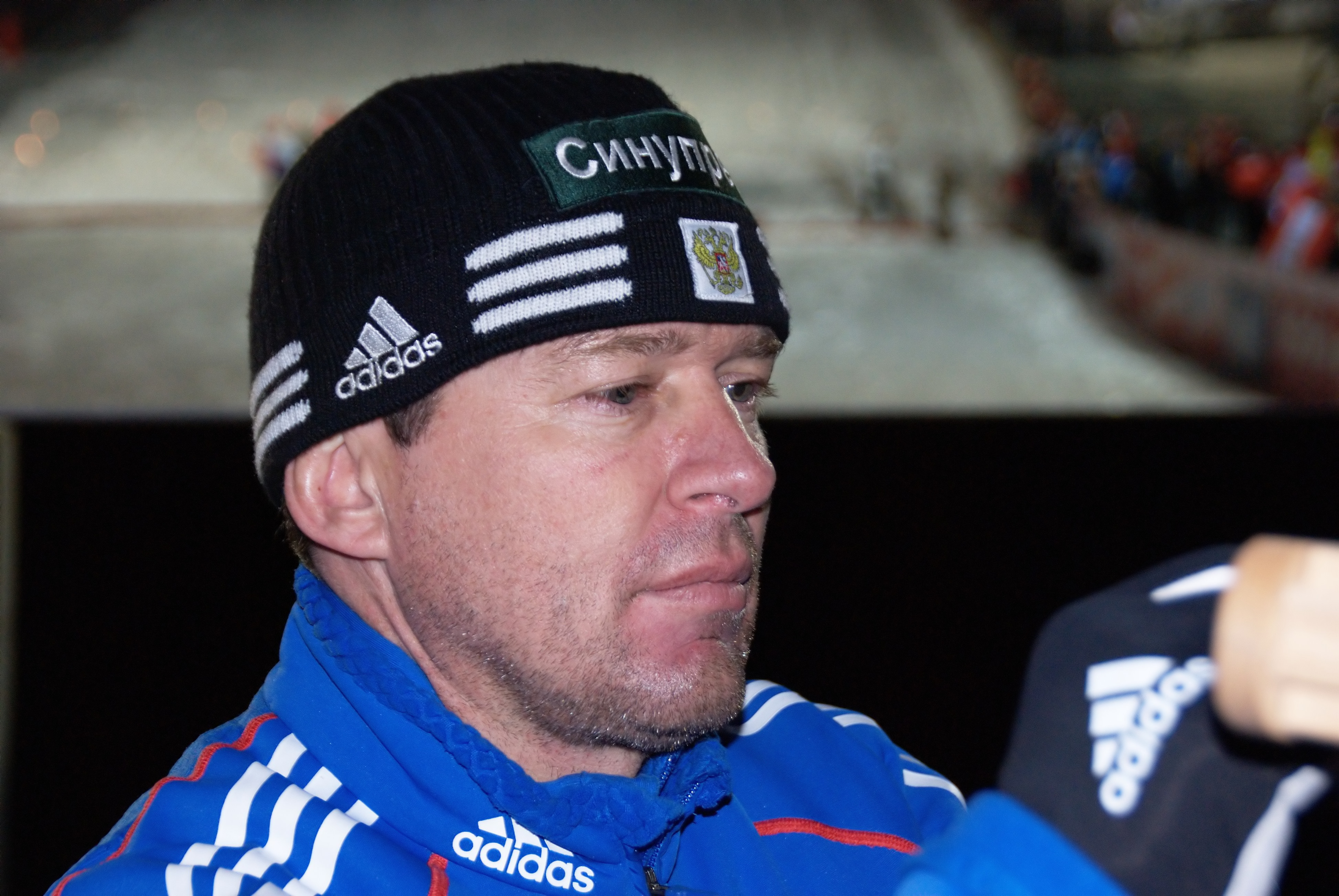 Der russische Skisprung Nationaltrainer Wolfgang Steiert im Februar 2009